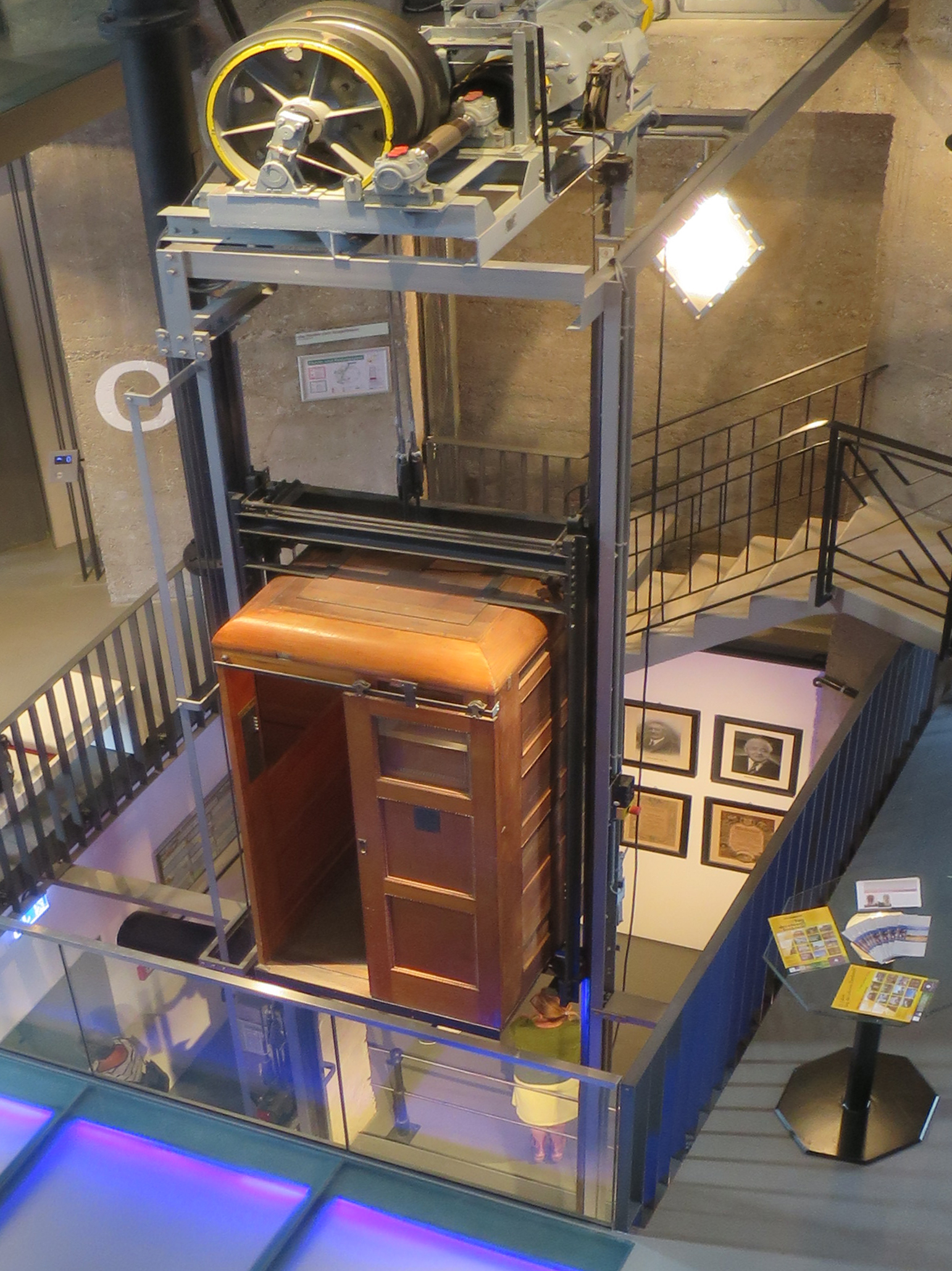 Aufzugmuseum Mannheim-Seckenheim